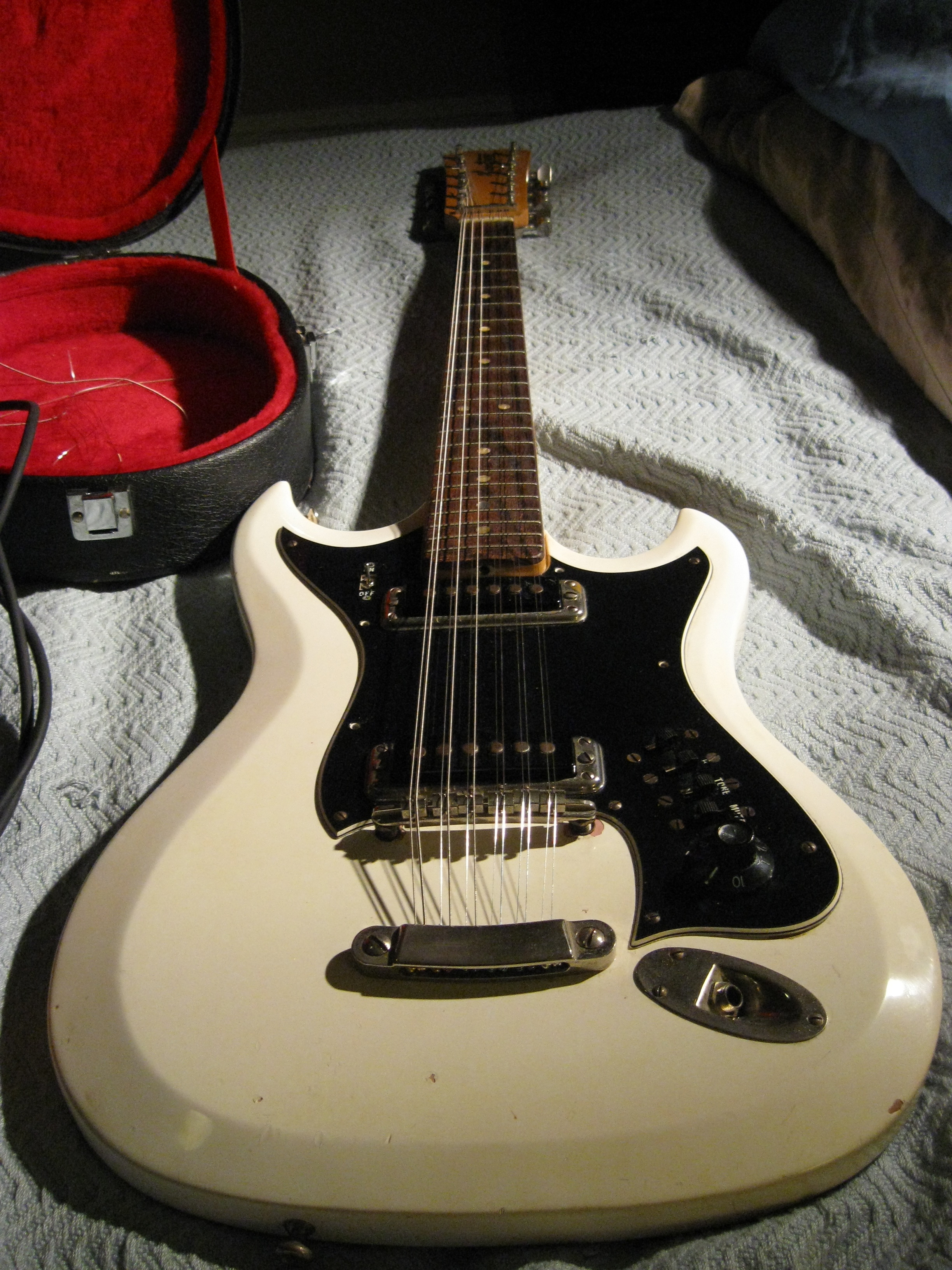 Hagström 12 string guitar